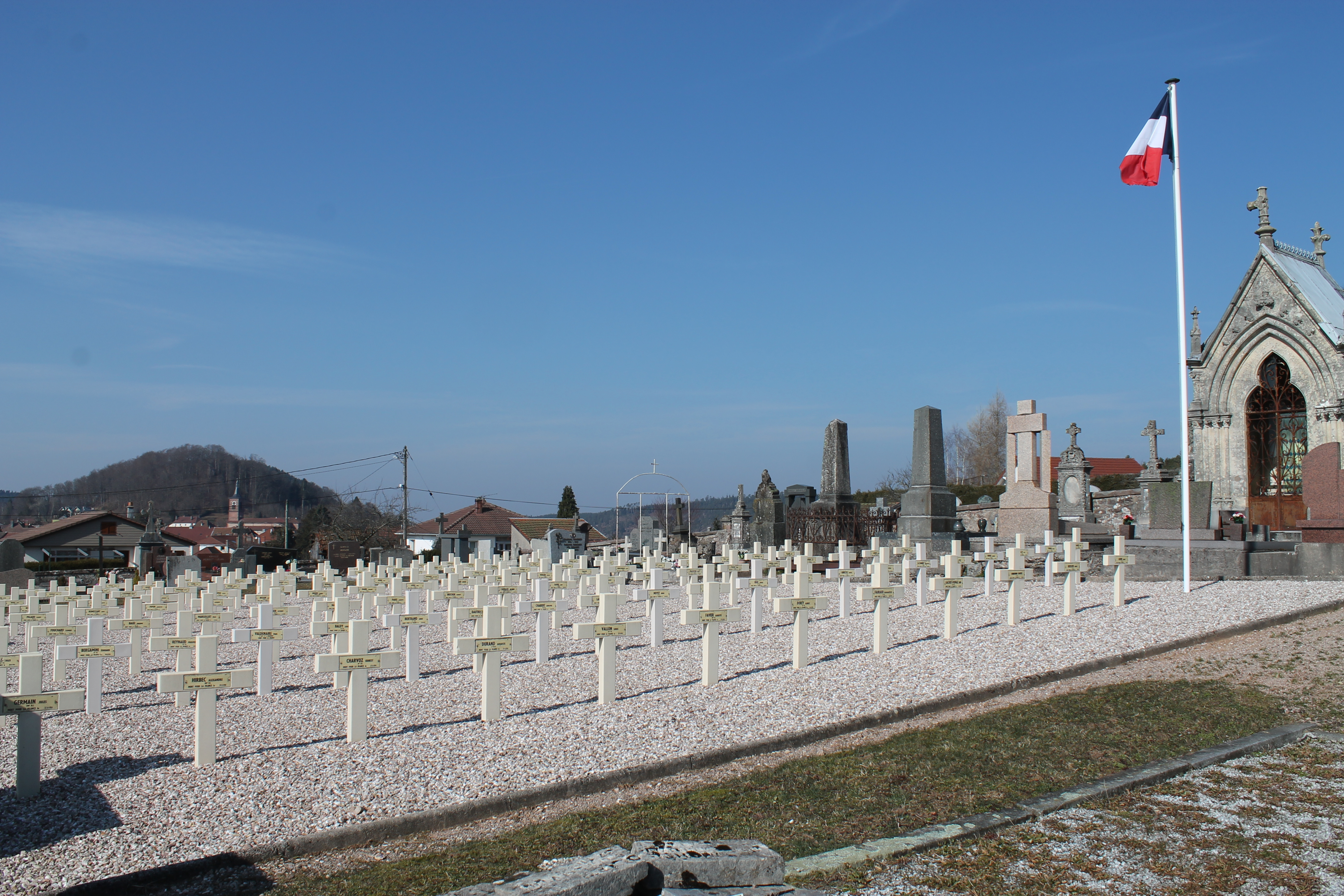 Carré militaire du cimetière de Bruyères.